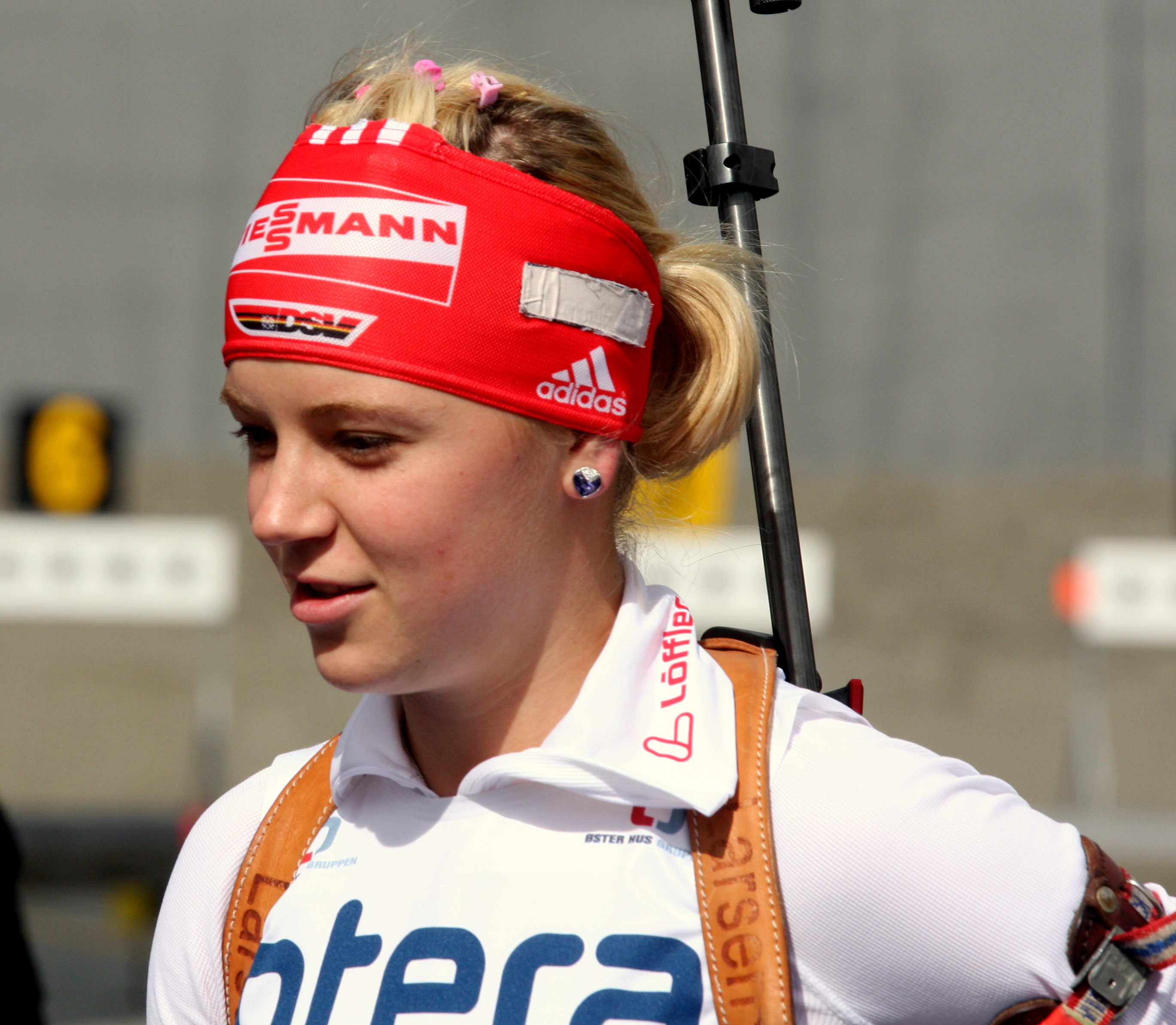 Miriam Gössner under Blinkfestivalen i Sandnes 2009